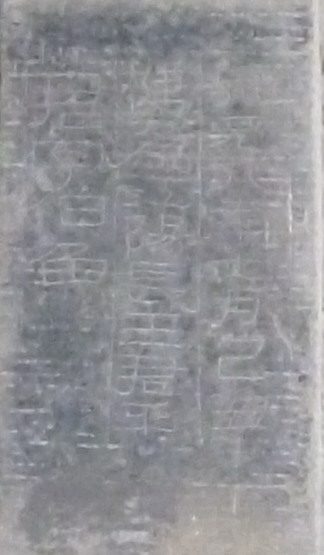 中文（中国大陆）: 江阳汉阙刻石：“永元九年七月己丑,犍为江阳长王君平,君字伯鱼”